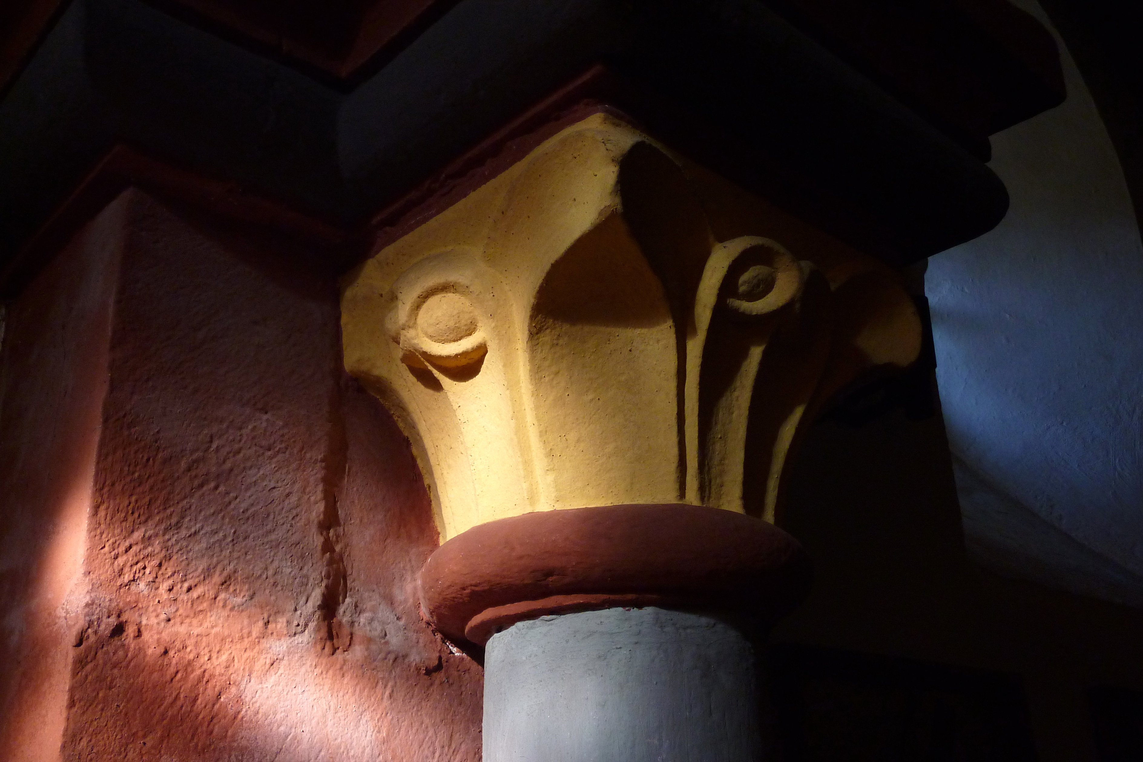 Ehemaliges Zisterzienserinnenkloster Sankt Thomas an der Kyll in Sankt Thomas im Eifelkreis Bitburg-Prüm (Rheinland-Pfalz), Wandsäule mit Knospenkapitell